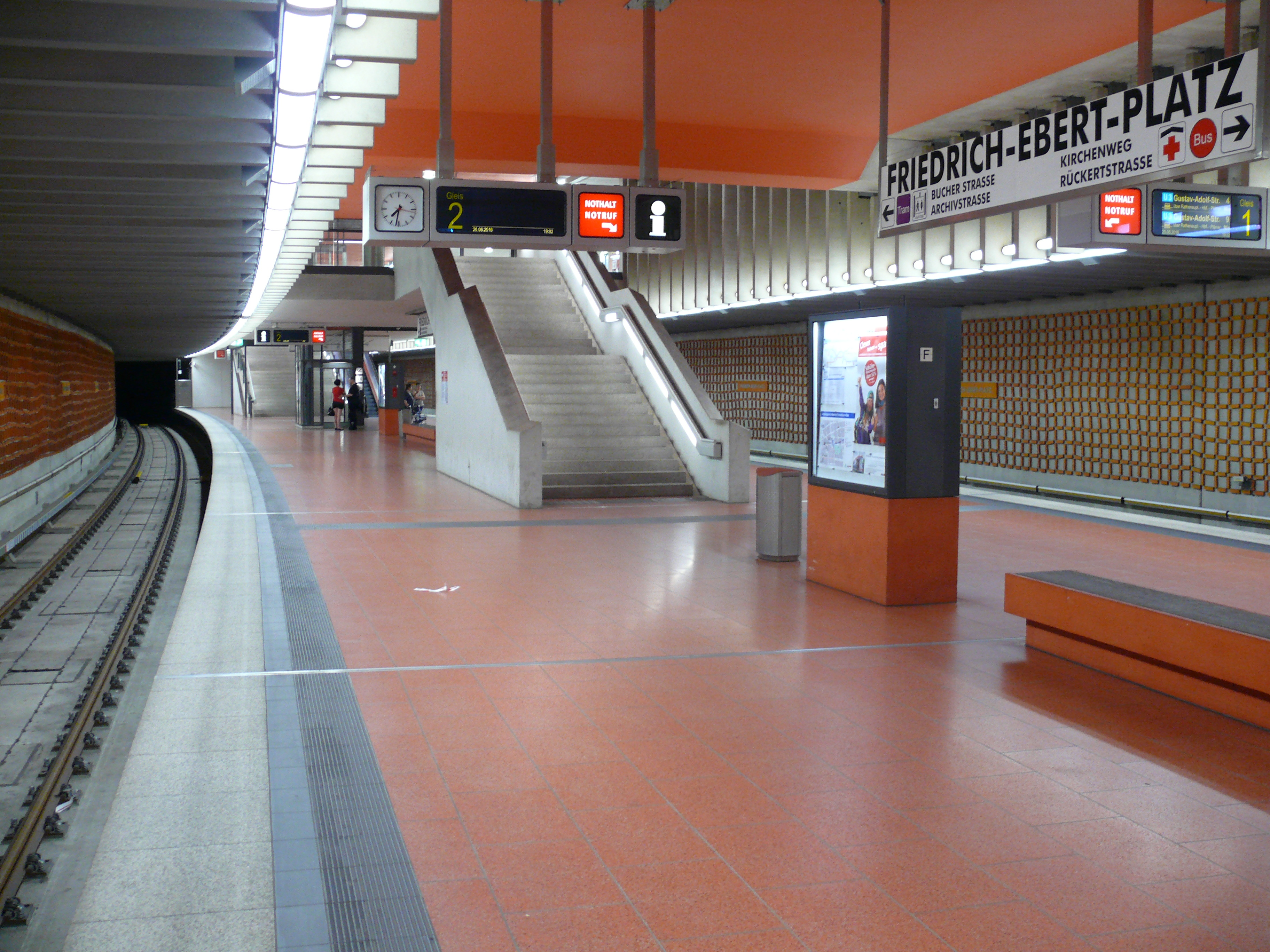 Bhnsteigebene am U-Bahnhof Friedrich-Ebert-Platz in Nürnberg.